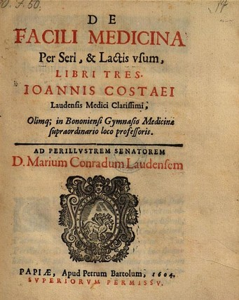 Johannes Costaeus Laudensis (1528–1603), De facili medicina per seri et lactis usum, 1604